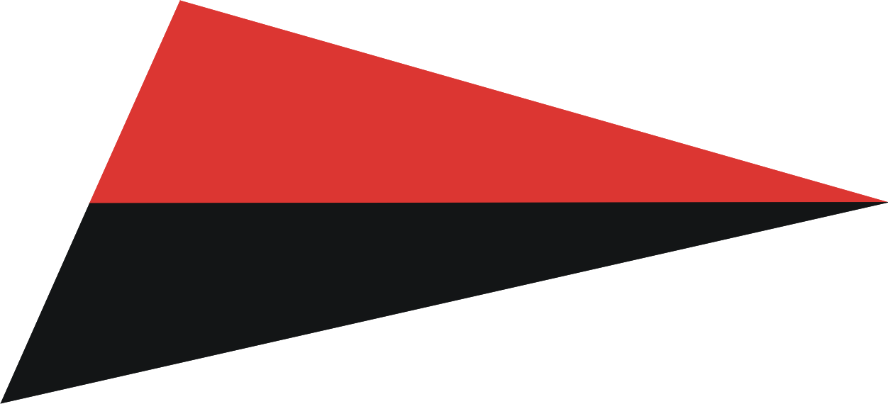 LWP - barwy broni na kołnierze kurtek, obowiązujące od stycznia 1945 - saperzy mostowi i elektrotechnicy